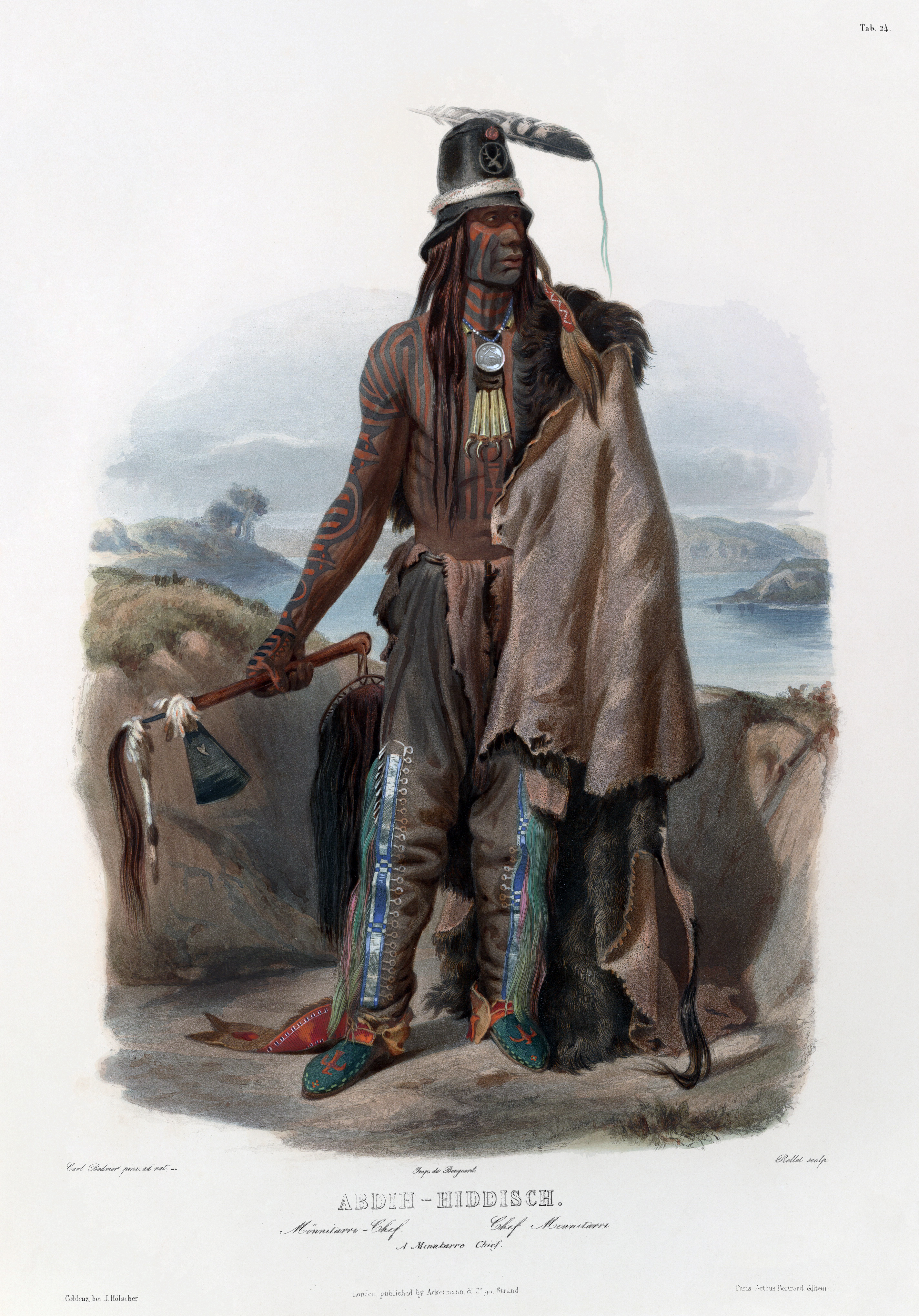 A Minatarre chief